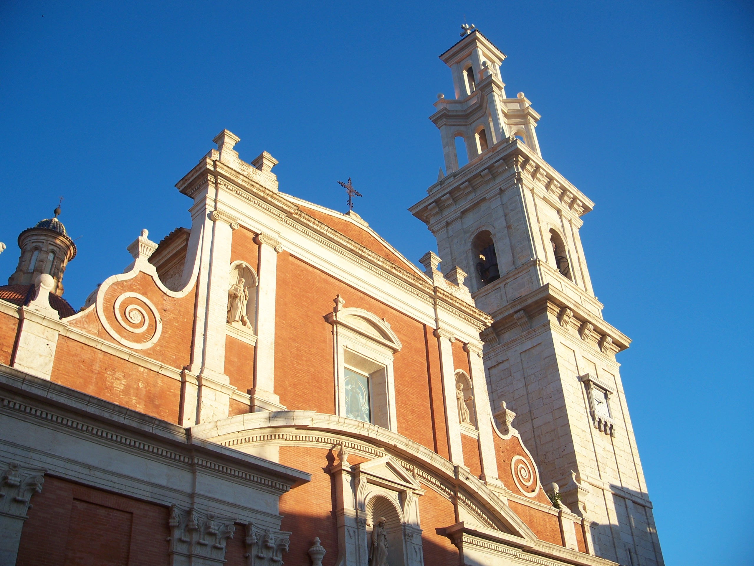 Iglesia_de_Turís,_La_Ribera_Alta